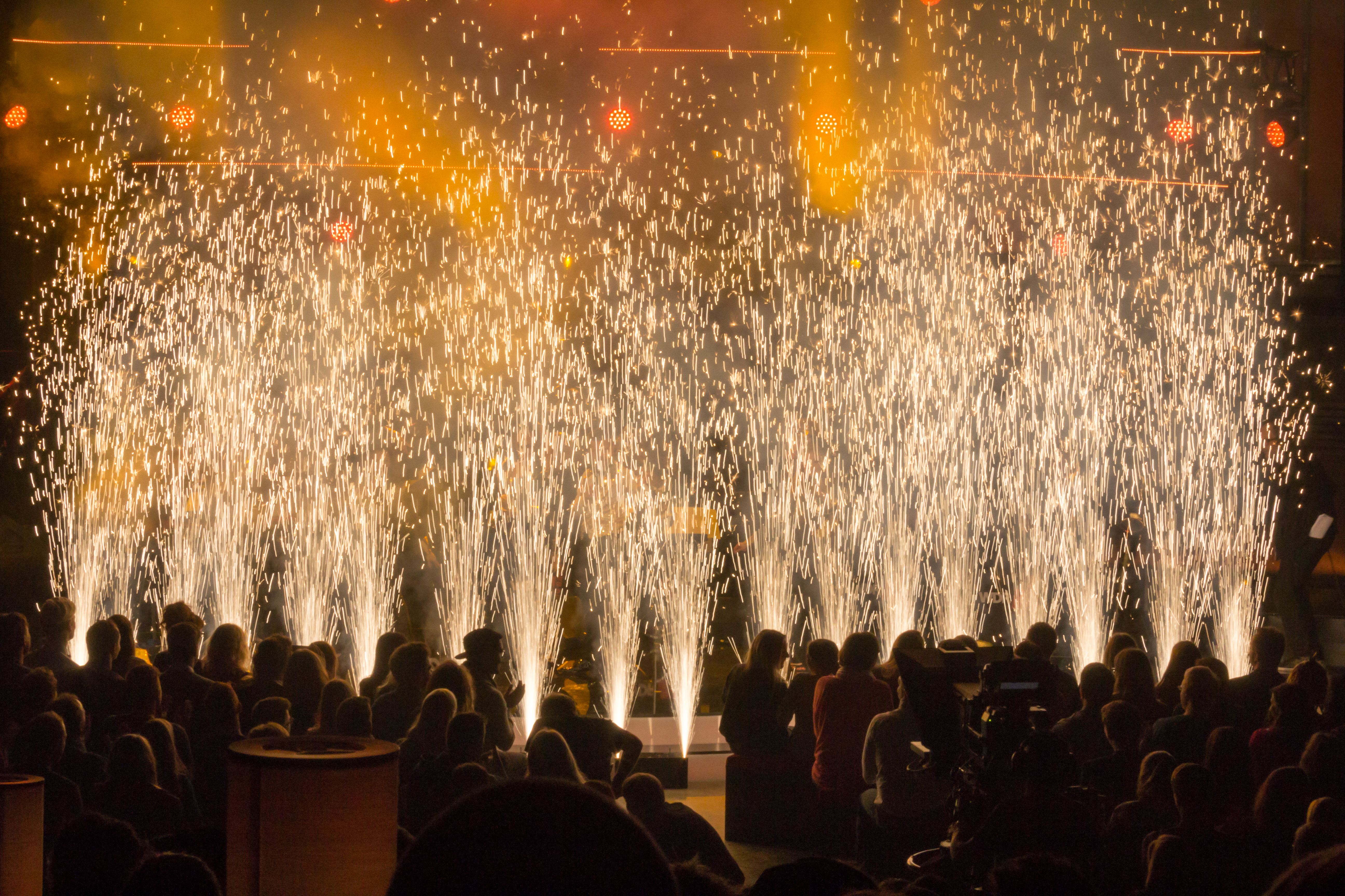 1LIVE Krone 2016 - 2015 - Show - Bühnenfeuerwerk am Ende der Darbietung von Klaas Heufer-Umlauf und der WDR Big Band